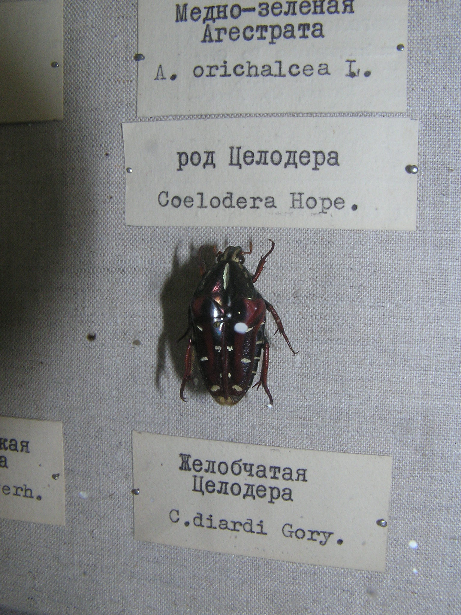 Coelodera diardi = Coilodera diardi